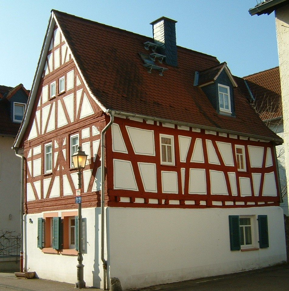 Taunusstr. 9a in Schwalbach am Taunus (Seite)